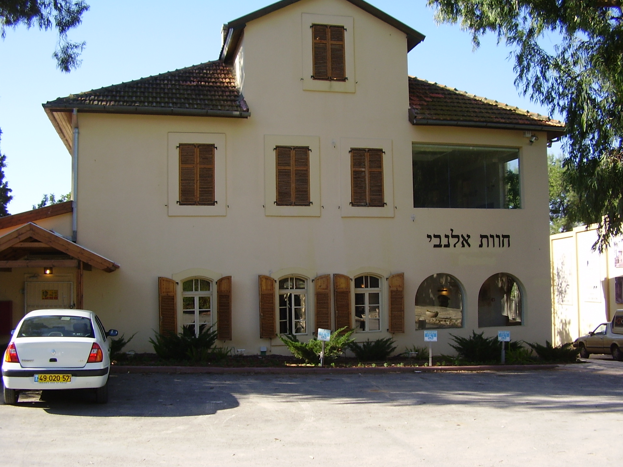 Das Beith Allenby, jetzt Restaurant Allenby Farm ehemals Direktorenhaus des Landgutes Bir Salem, ein Vorwerk des "Syrischen Waisenhauses" in Jerusalem, Matthäus Spohn war langjähriger Leiter von Gut und Waisenhaus